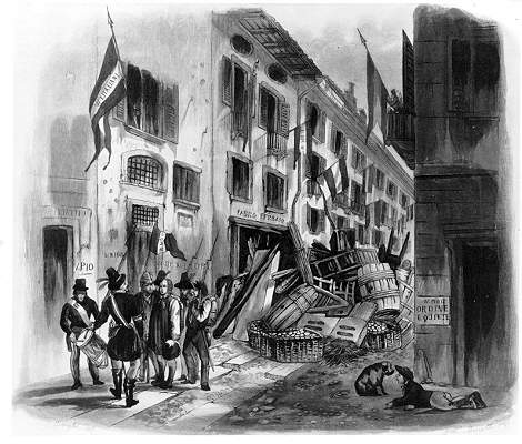 Cinque giornate di Milano - Italienische Unabhängigkeitskriege